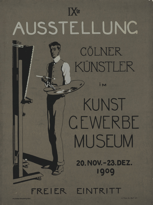 Plakat in den Maßen circa 100,8 x 75,3 cm der Druckerei M. DuMont Schauberg nach einem früheren Entwurf von August L. M. Neven Du Mont von 1904 für die „IXte Ausstellung Cölner Künstler im Museum für Angewandte Kunst Köln|Kunst Gewerbe Museum 20. Nov. - 23. Dez. 1909 // Freier Eintritt“ ...